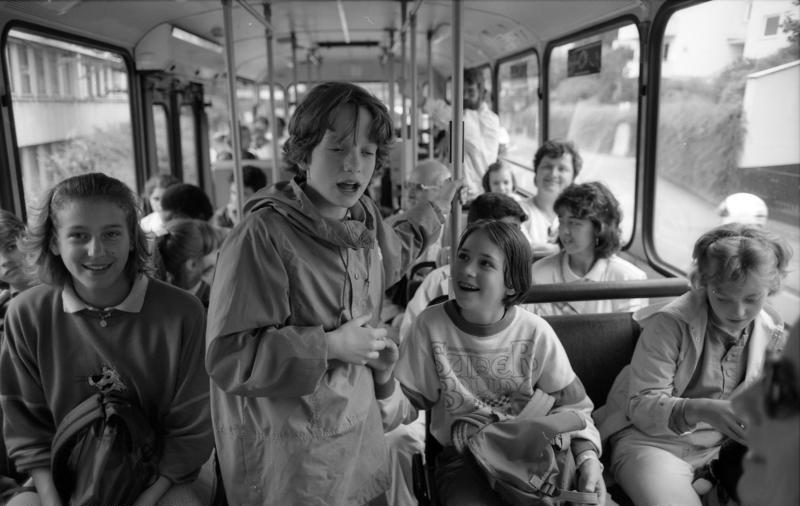 Juni 1988 Bonn, Straßenbahn